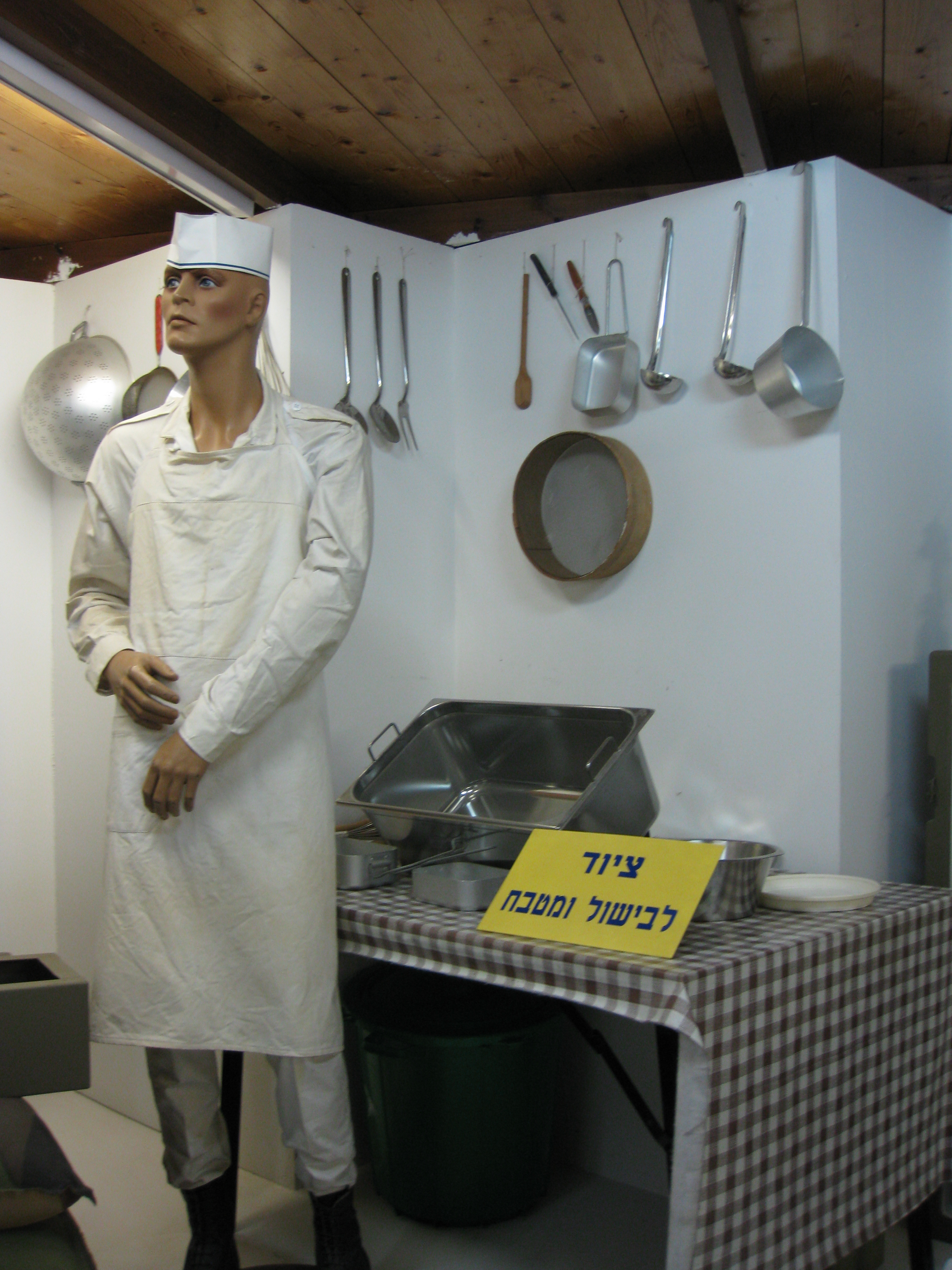 Batey ha-Osef Museum מוזיאון בתי האוסף